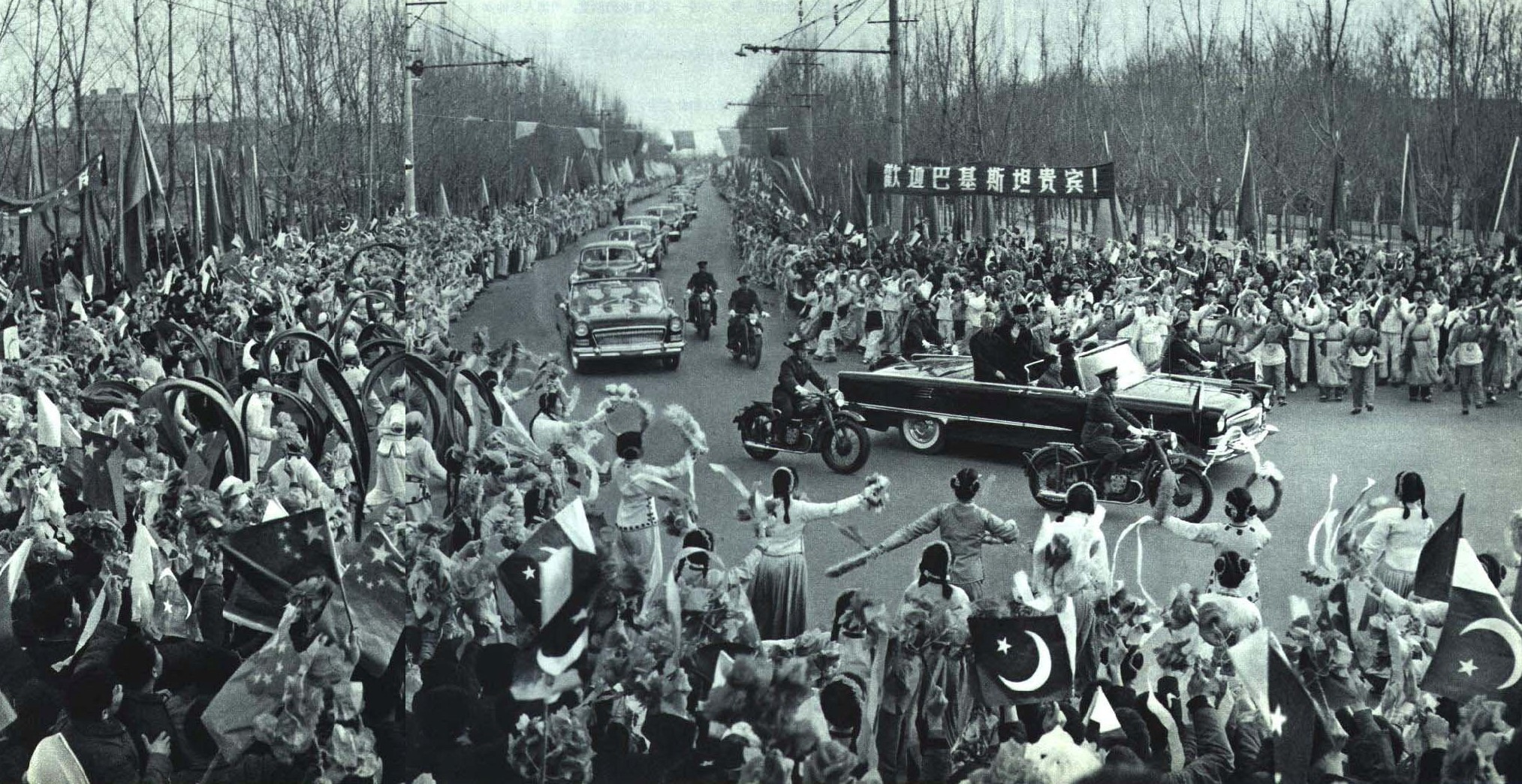 1965-5 1965年 阿尤布·汗访问北京